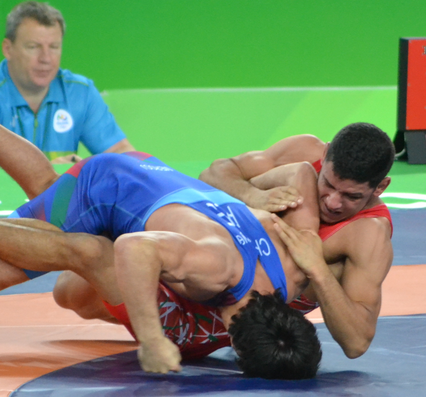 disputa de wrestling